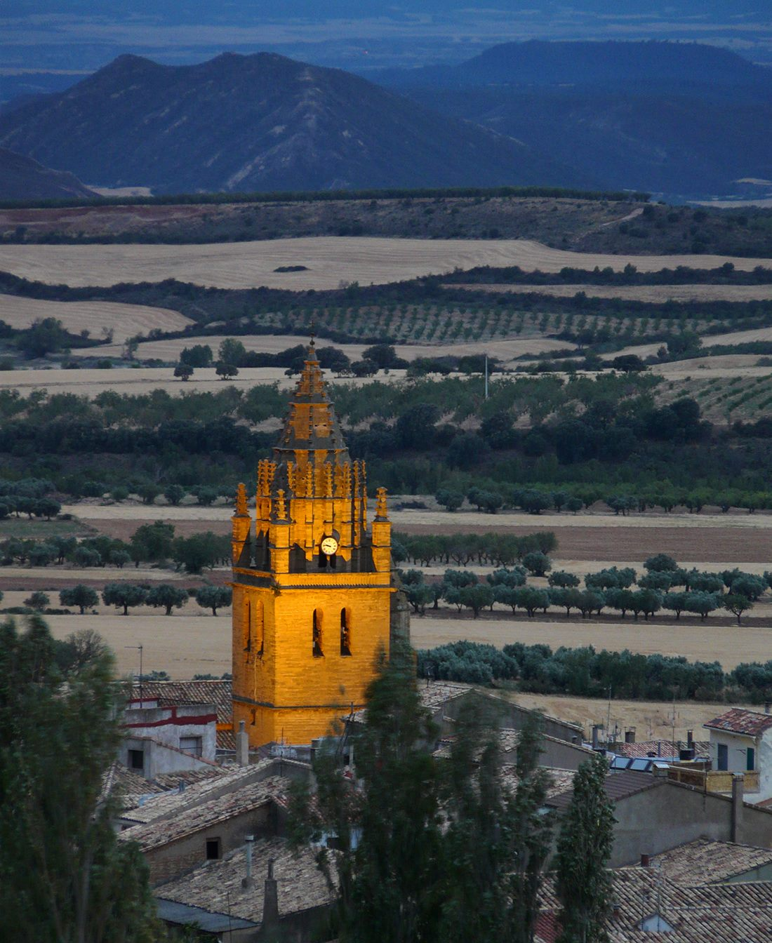 Campanario iluminado de la Iglesia parroquial de Loarre al atardecer, imagen tomada desde lo alto del pueblo